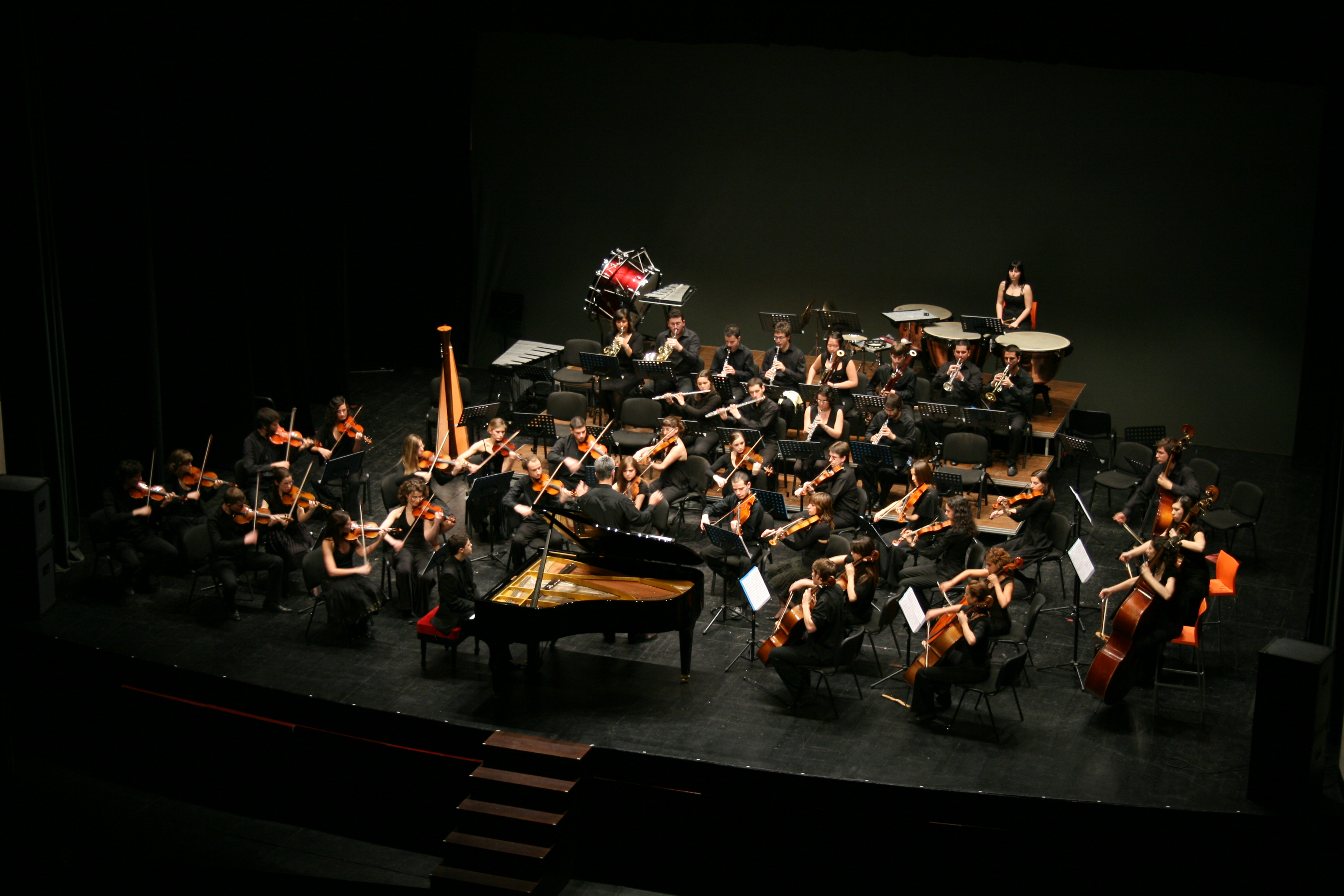 Orchestra del Conservatorio de Badajoz en el Teatro López de Ayala